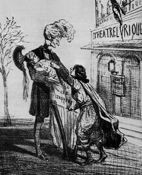 Berlioz - caricature de Cham sur Tannhauser et Les Troyens